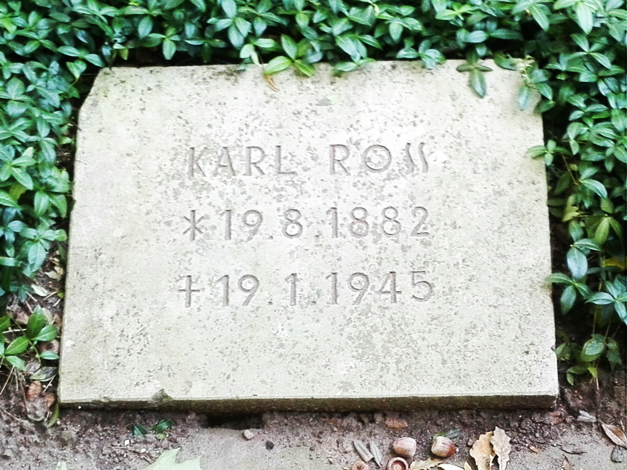 Blick von der in Sgraffitto von Walther Jahn gestalteten Wand links des Hauptportals der Gedenkstätte der Opfer der Gewaltherrschaft des auf den Gedenkstein Karl Ross' im zentralem Feld des Innenhofs.